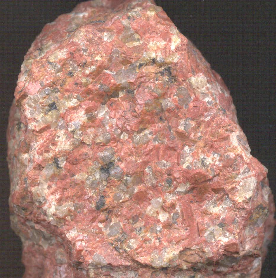 Alkaligranit mit roten Kalifeldspäten. Eiszeitliches Geschiebe aus der Altmark. Herkunft: wahrscheinlich Südostschweden (Smaland). Breite des Steines: ca. 6 cm